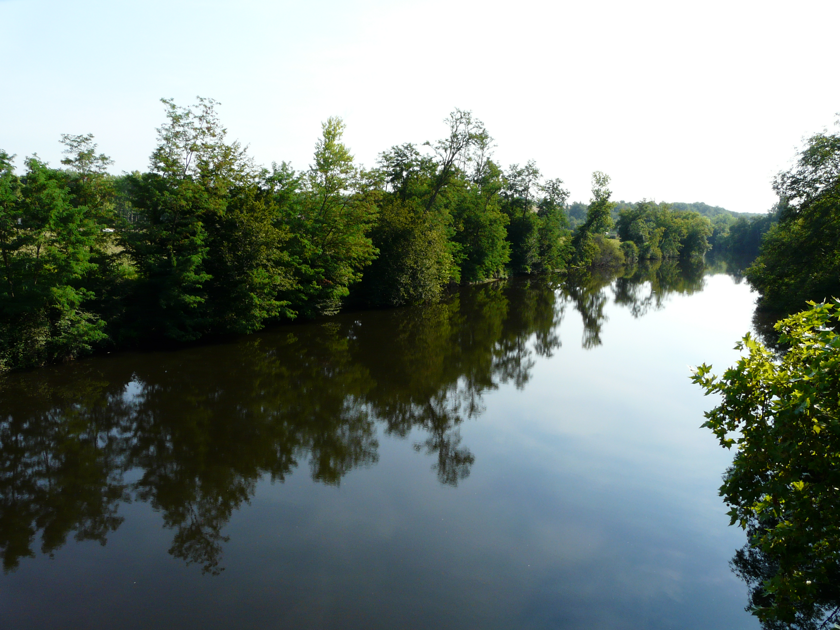 La Vézère en amont du pont de la route départementale 39, entre les communes de Mansac (Corrèze) à gauche et Pazayac (Dordogne) à droite.